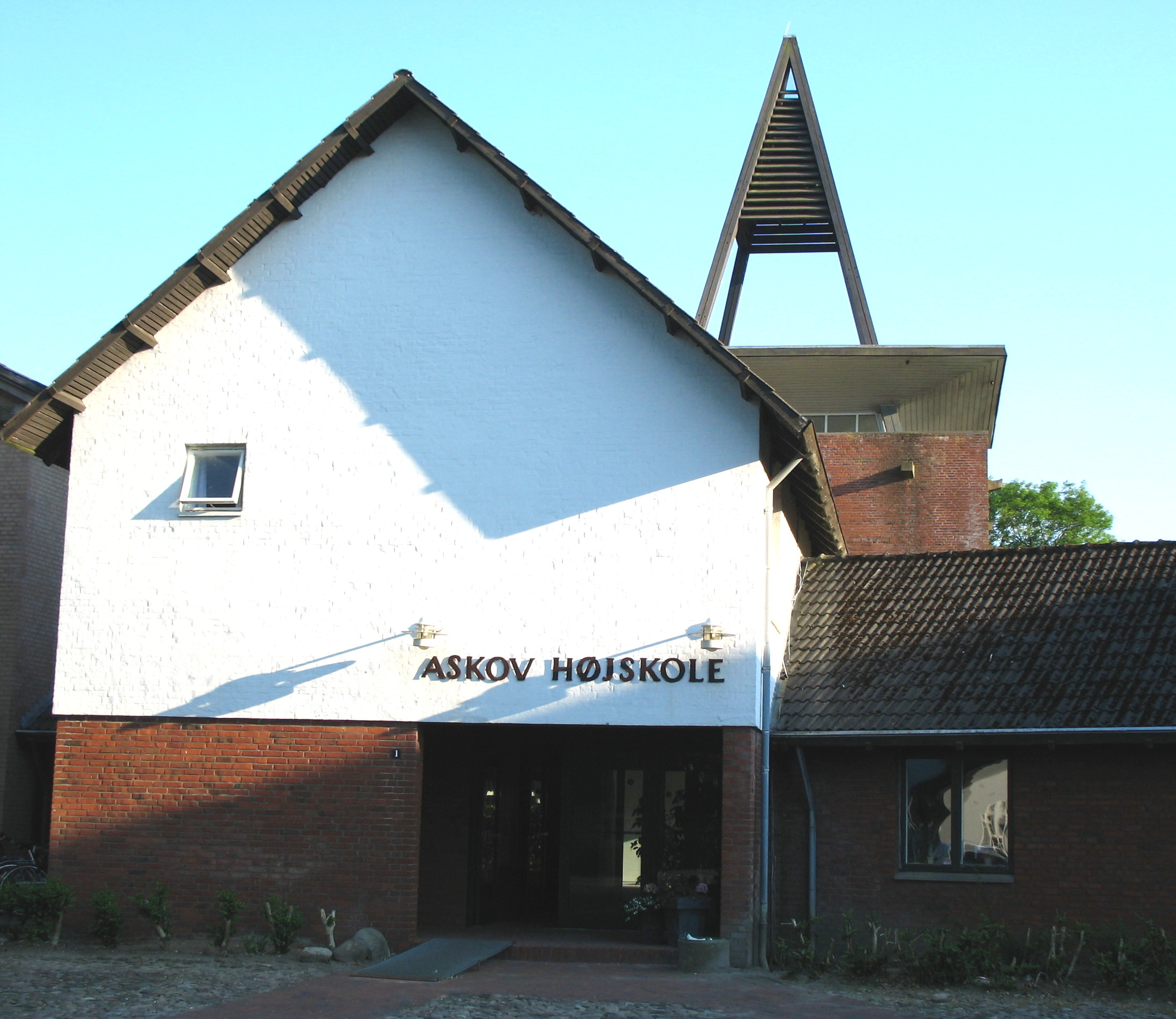 Askov Højskole.